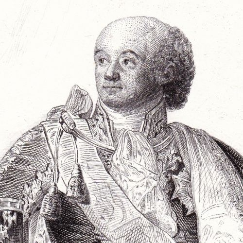 Le maréchal Catherine-Dominique de Pérignon (1754-1818).